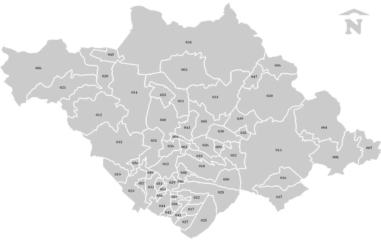 Municipios de Tlaxcala con Clave municipal